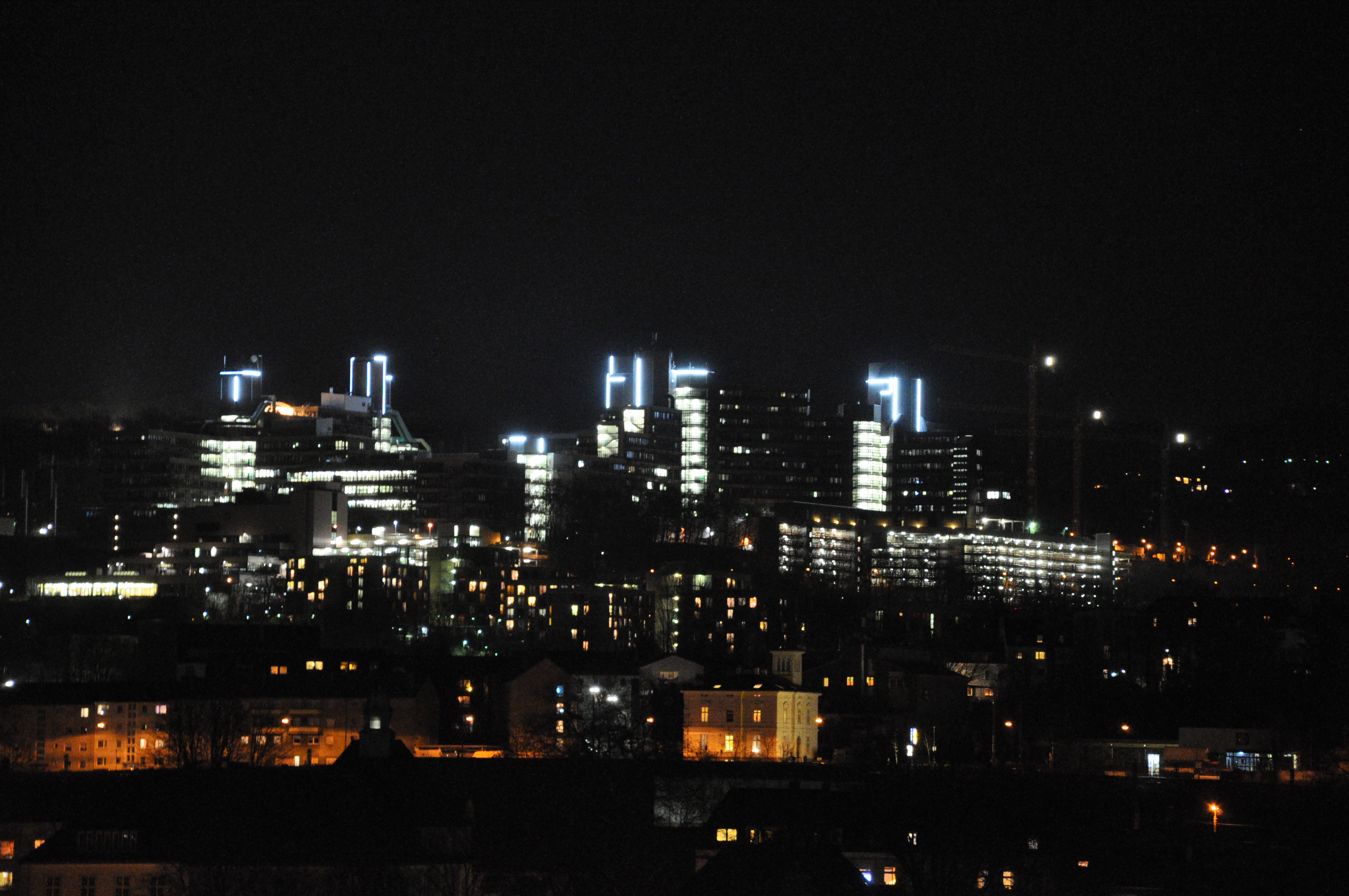 Nützenberger Straße, Wuppertal